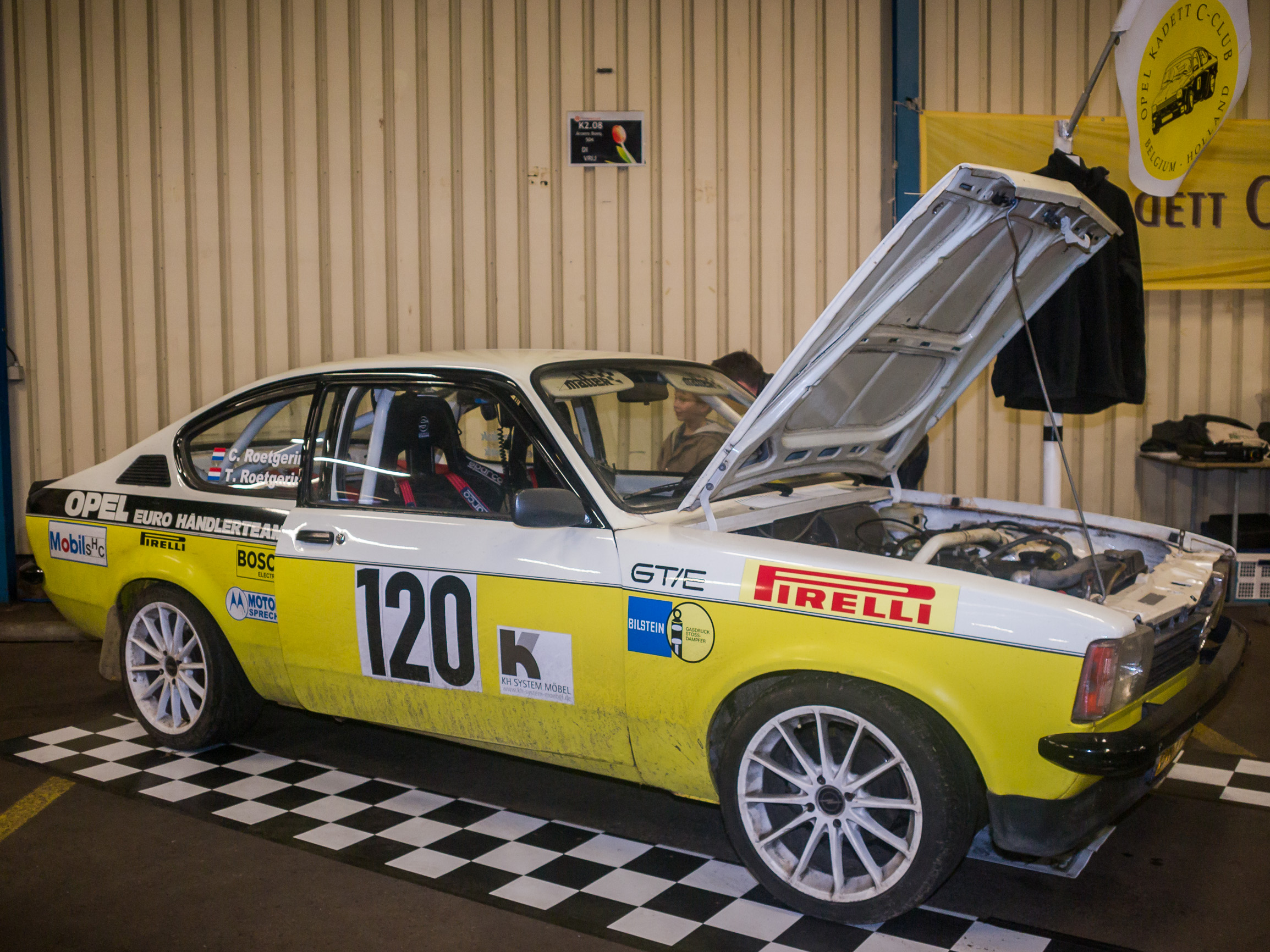 Oldtimer show Eelde 2013 - Opel Kadet rally